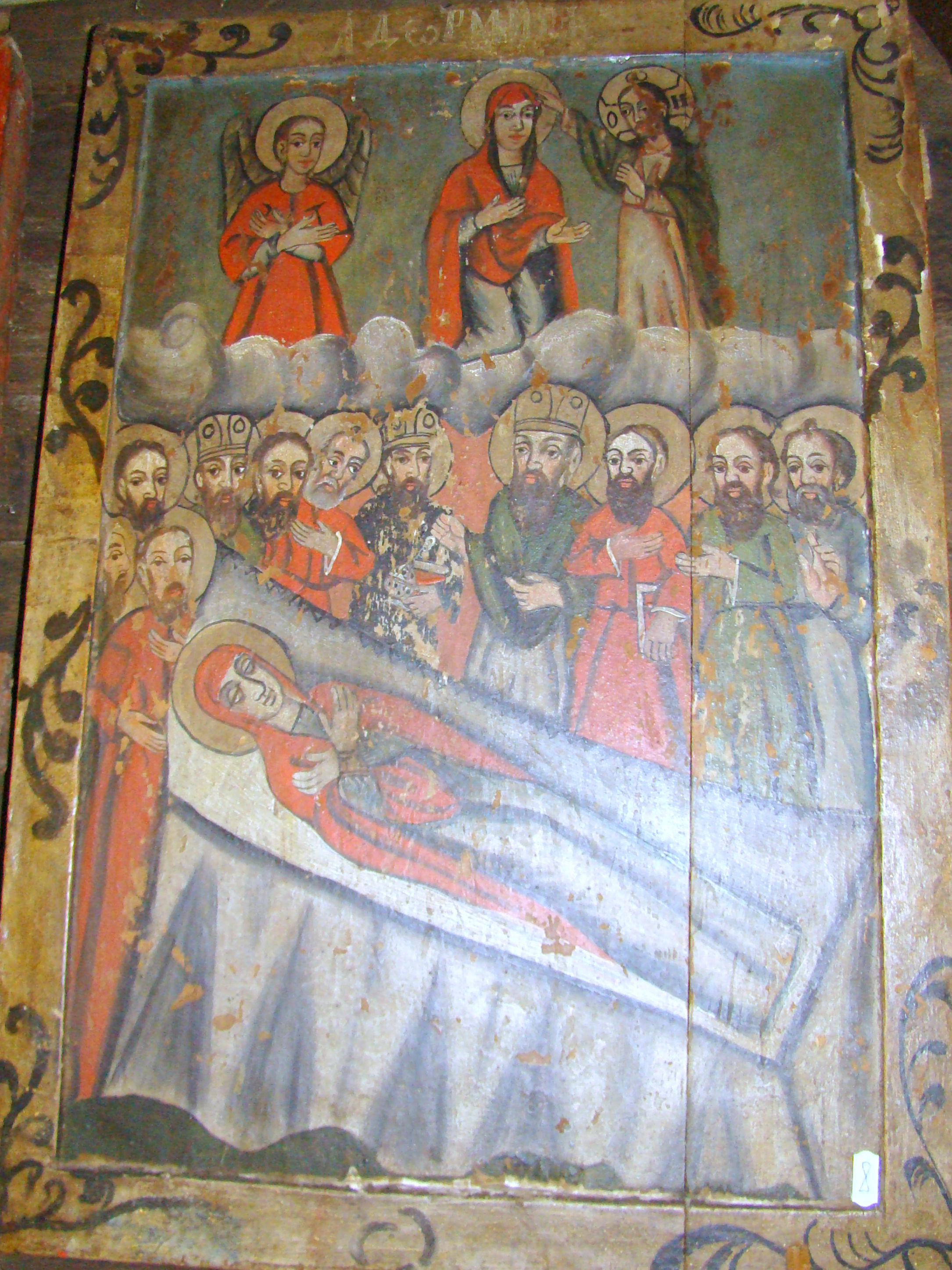 Biserica de lemn din Tinca, județul Bihor